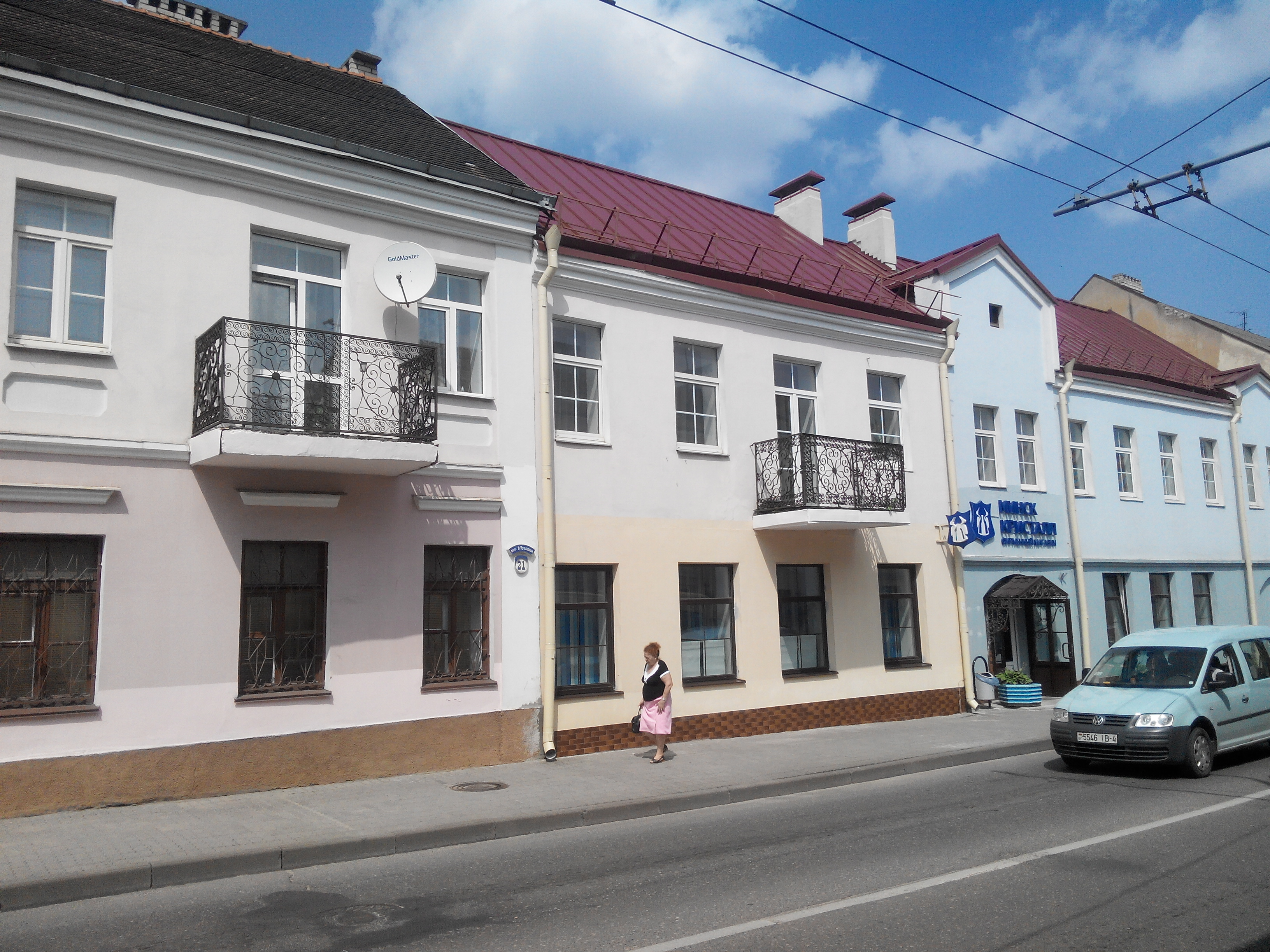 Будынак па вуліцы Вялікая Траецкая, 19, Гродна, Беларусь